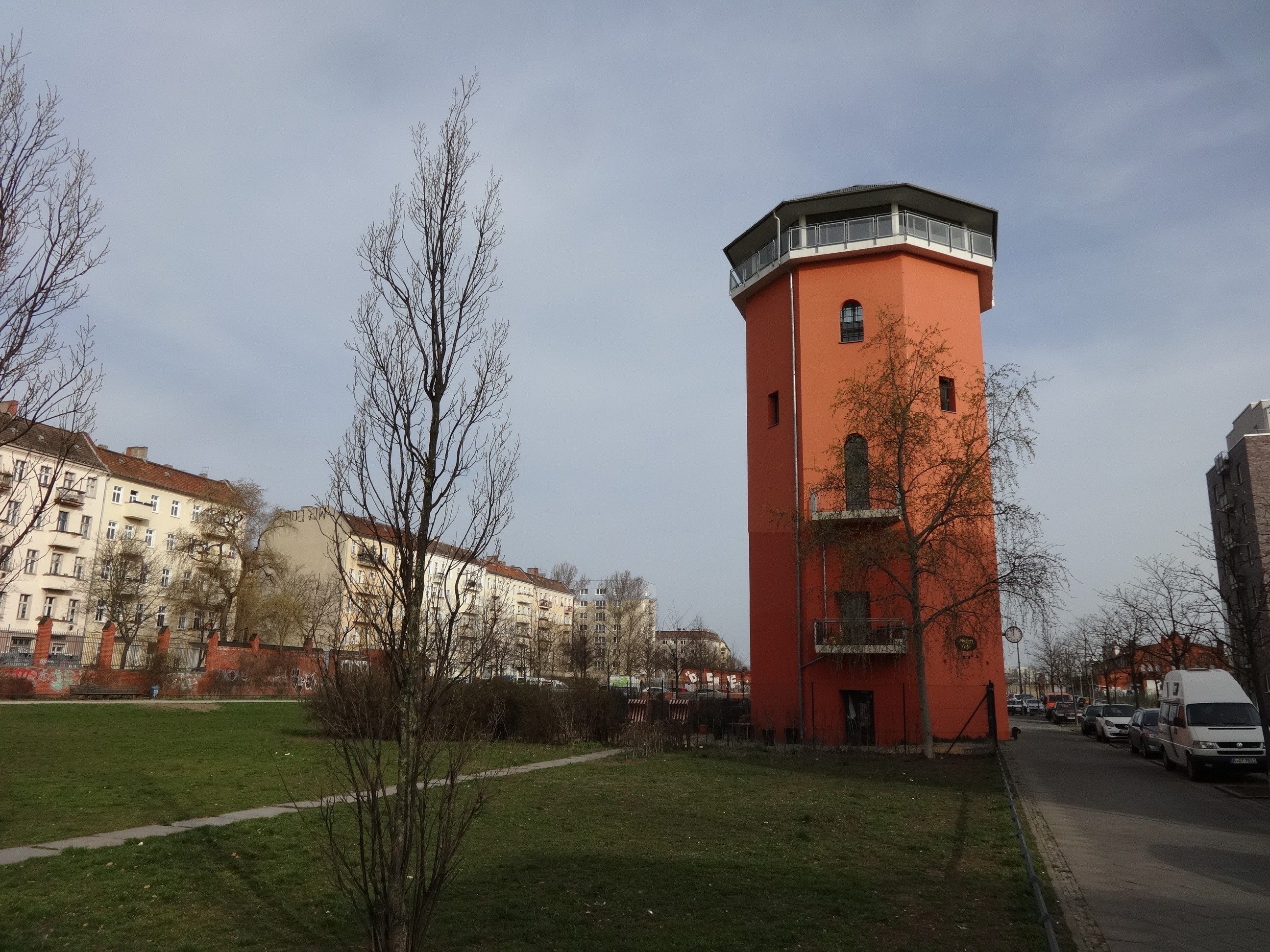 Der Hausburgpark ist eine rund 12.000 m² große Grünfläche in Berlin-Prenzlauer Berg. Er liegt auf dem 1995 stillgelegten Zentralvieh- und Schlachthof und ist Bestandteil eines vom Berliner Senat geförderten Umbauprogramms Entwicklungsgebiet Alter Schlachthof. Auf der Flächen befinden sich insbesondere ein Spielplatz sowie ein unter Denkmalschutz stehender Wasserturm.